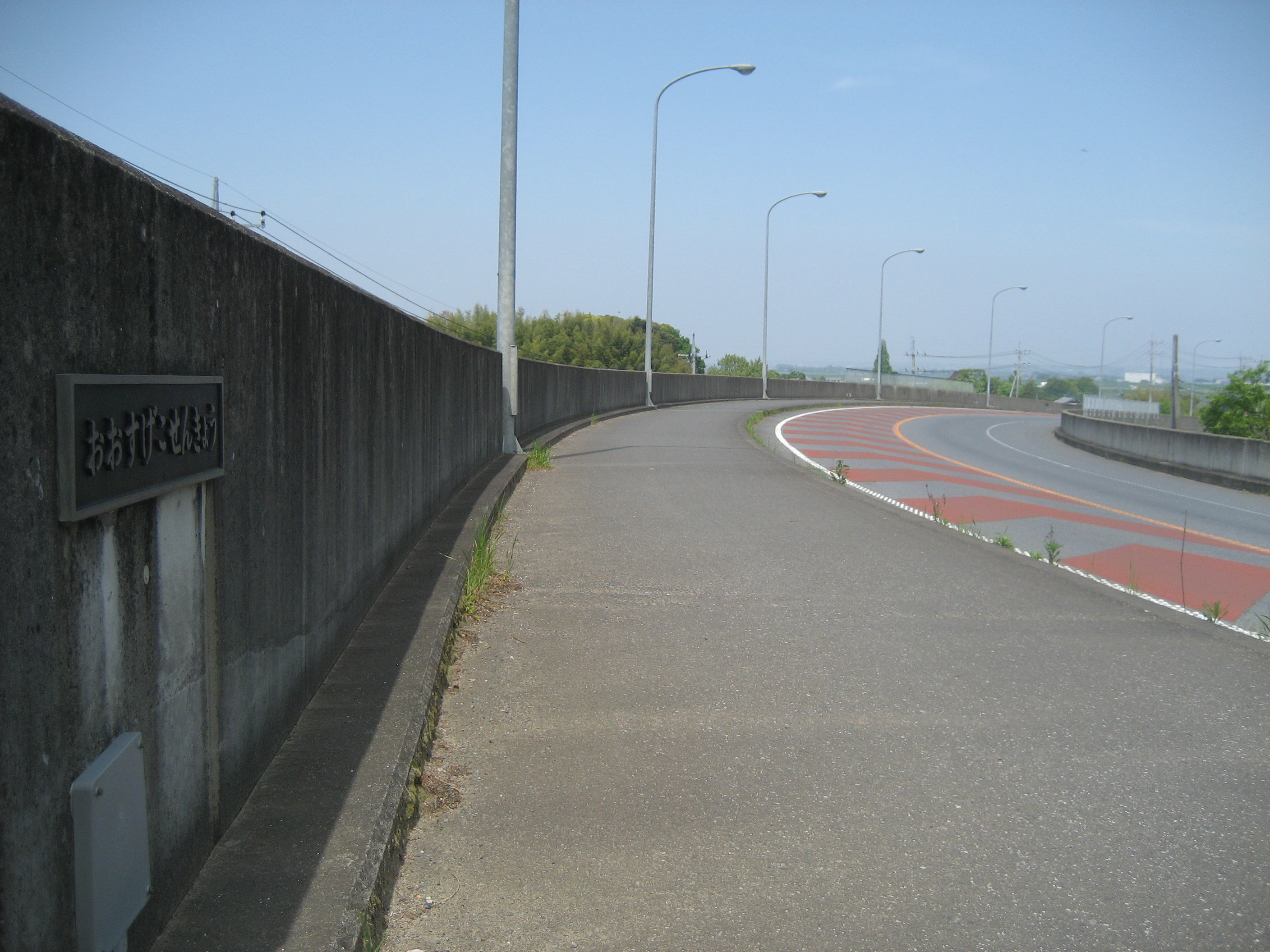 千葉県道103号線成田市大菅跨線橋上部を撮影